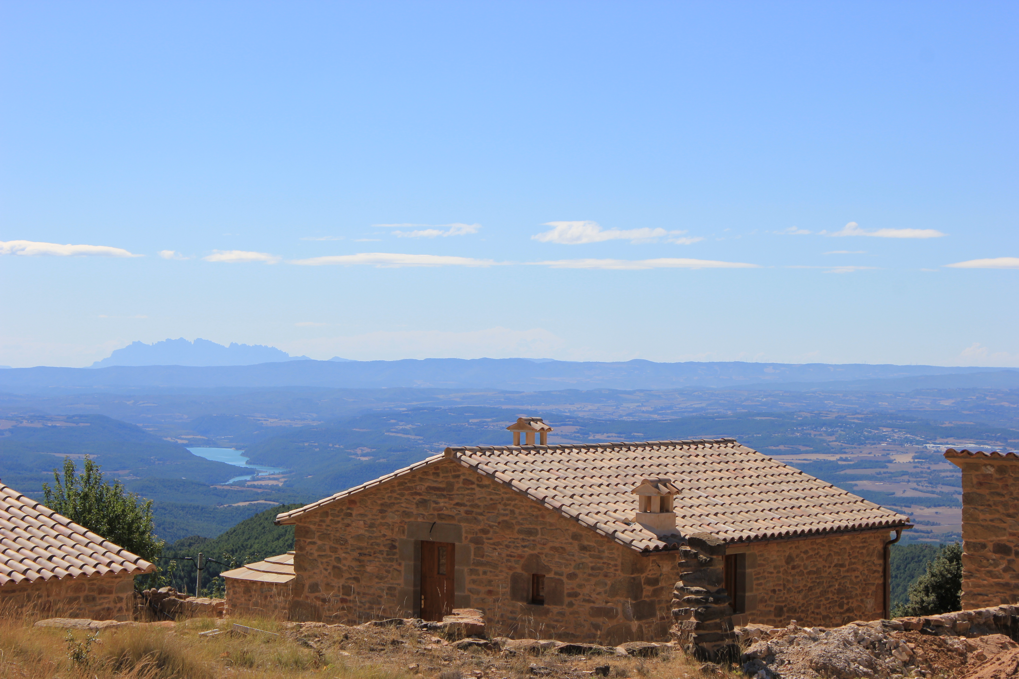 Masia de la Serra (Lladurs) en primer terme; al fons, el Pantà de Sant Ponts i Montserrat.